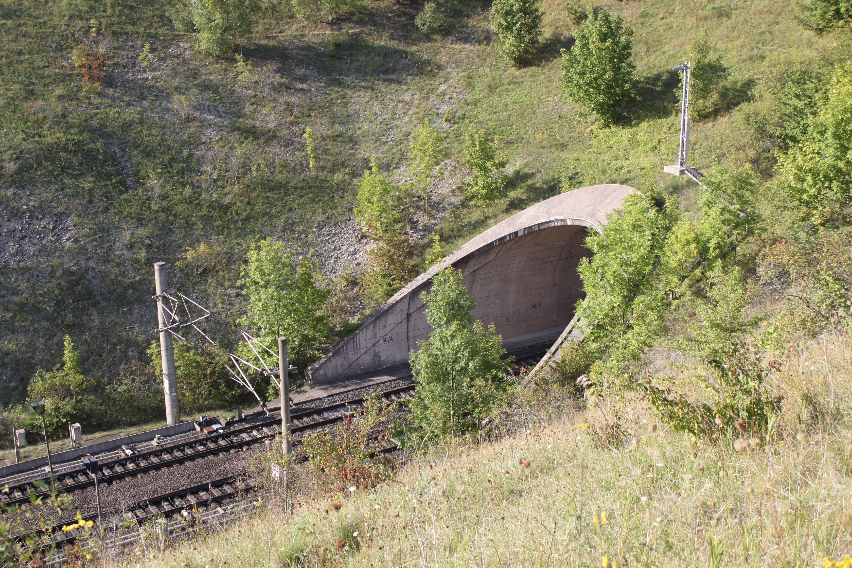 Überholbahnhof Jühnde